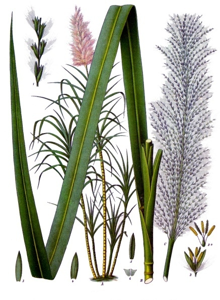 Zuckerrohr. A Pflanze, sehr verkleinert; B Stammstück mit Blatt, verkleinert; C Blüthenrispe, desgl.; 1 Theil eines Rispenastes, vergrössert; 2 Blüthe, desgl.; 2a Blüthe ohne Spelzen, desgl.; 3 Deckspelze, desgl.; 4 untere Hüllspelze, desgl.; 5 obere Hüllspelze, desgl.; 6 Blüthenhülle, desgl.